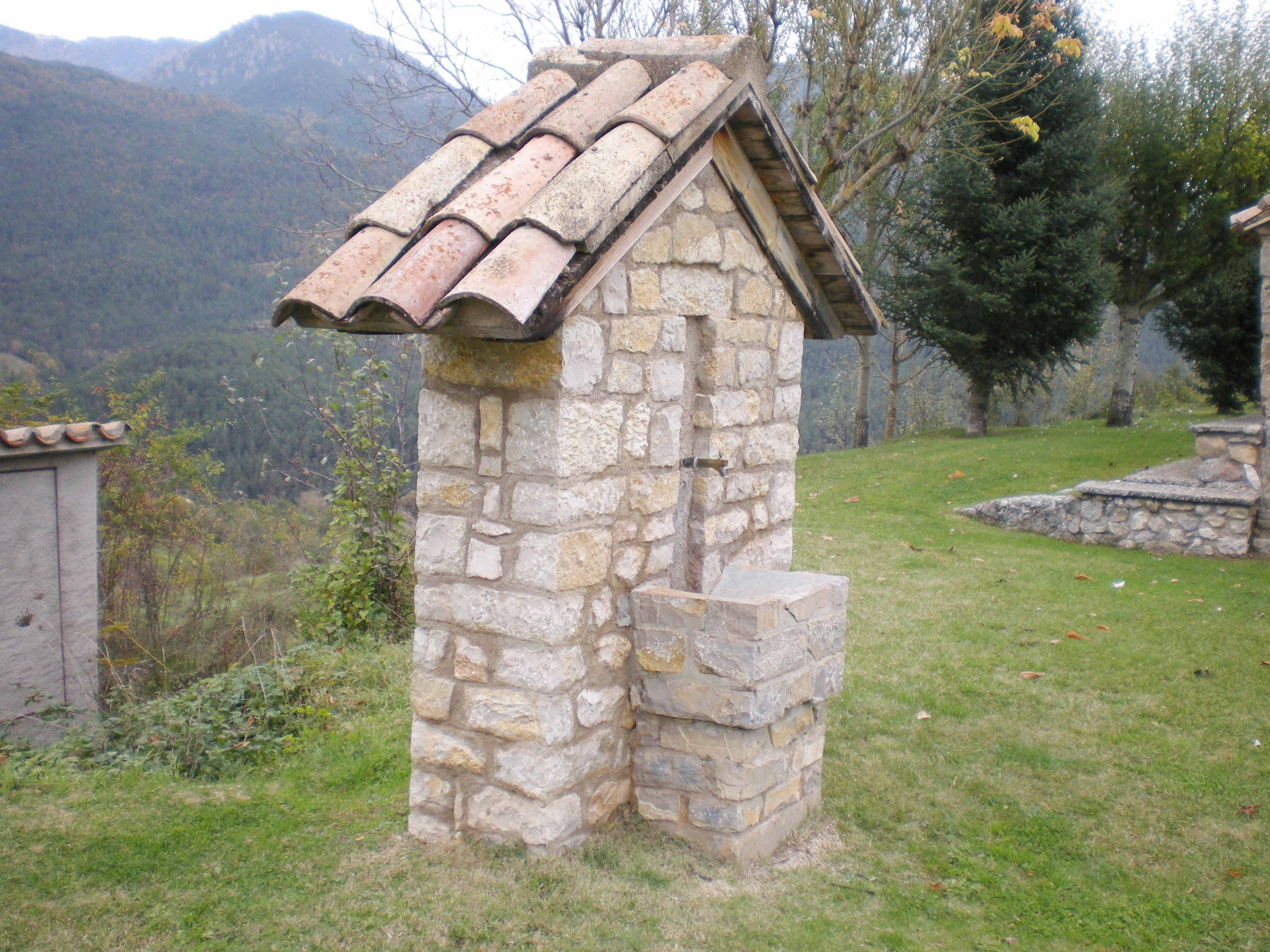 Font de la capella dels Àngels, a Sant Llorenç de Morunys (Solsonès)